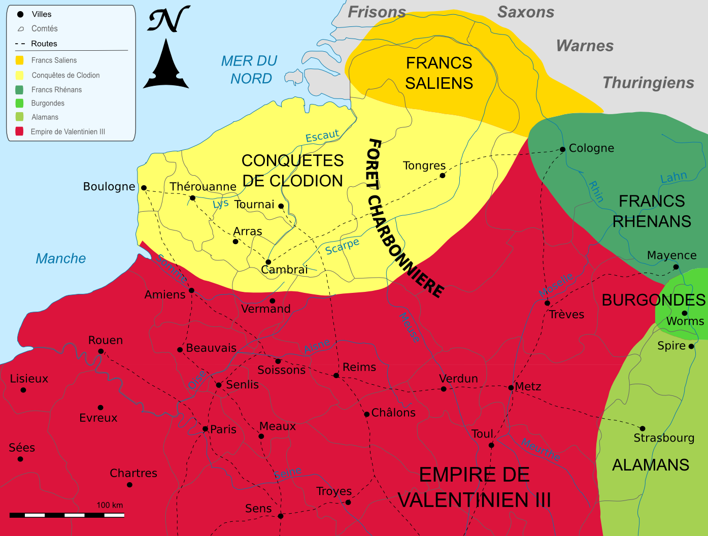 Conquêtes de Clodion le Chevelu en Gaule du Nord.